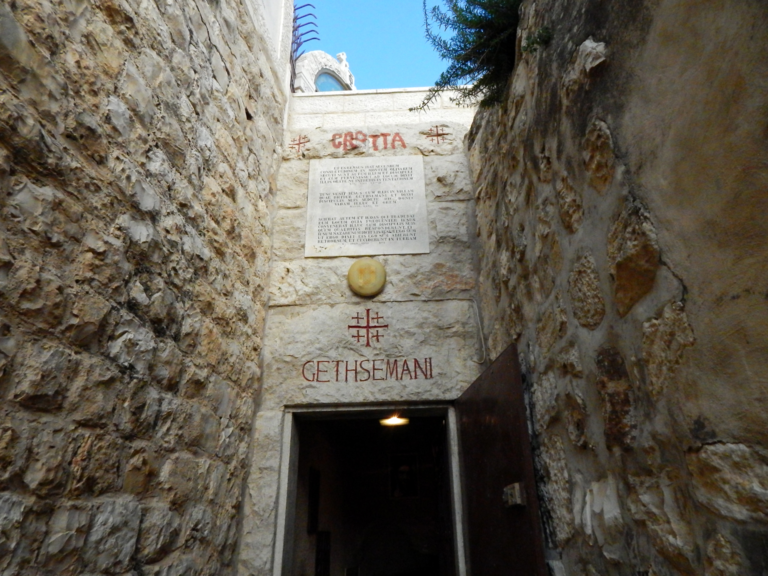 Jerozolima, Grota Pojmania Jezusa, Grota Getsemani